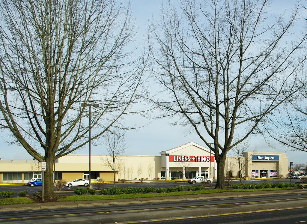 Lancaster Mall in Salem, OR, USA